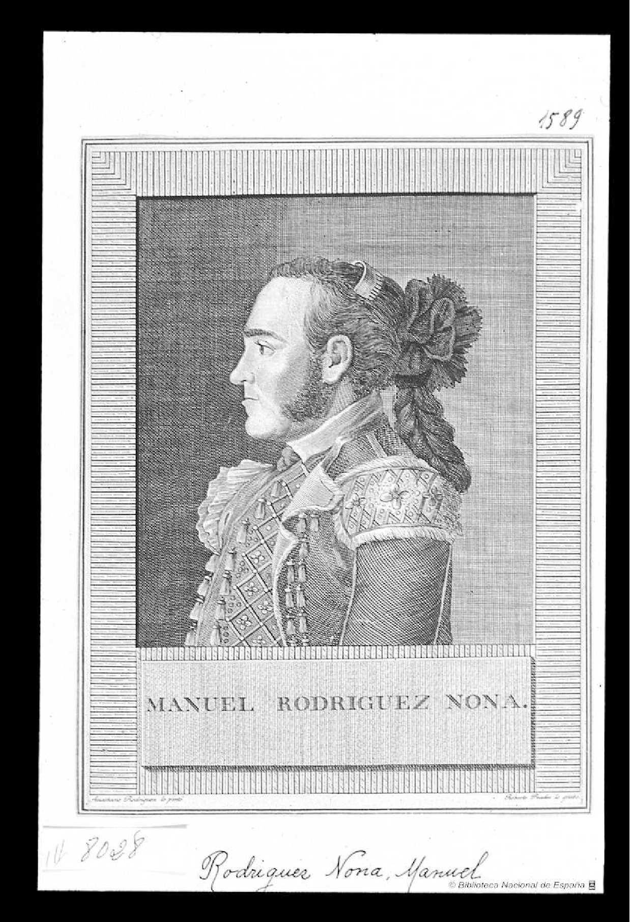 Retrato del banderillero Manuel Rodríguez Nona, Nonilla, grabado calcográfico de Roberto Prádez por dibujo de Anastasio Rodriguez